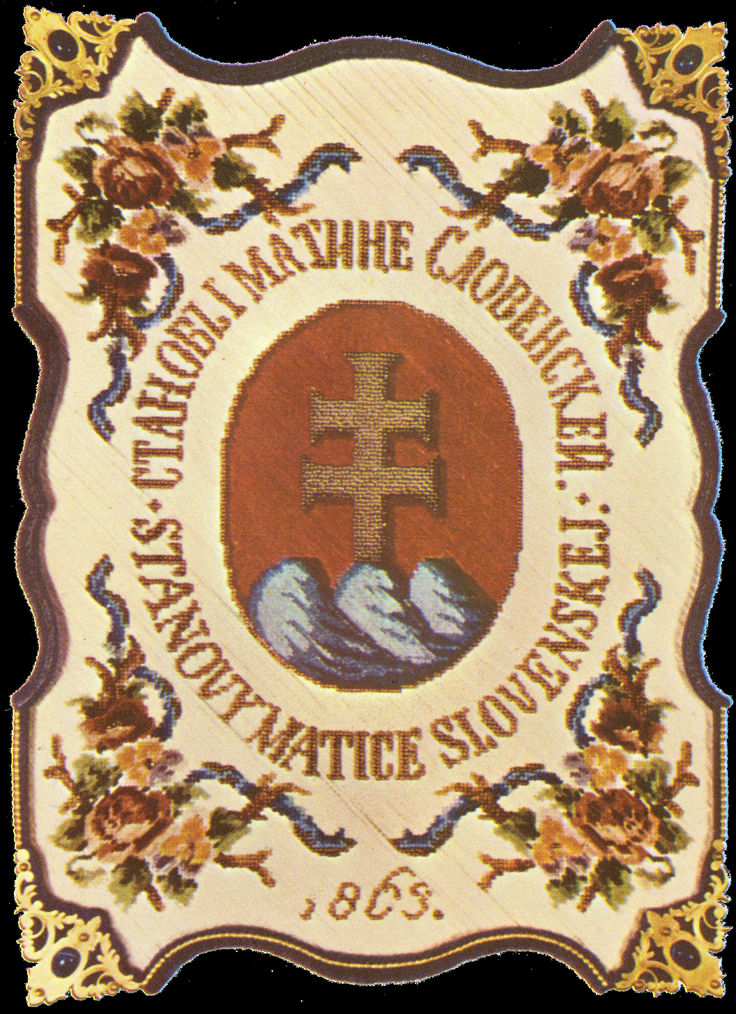 Obal prvých stanov Matice Slovenskej z roku 1863